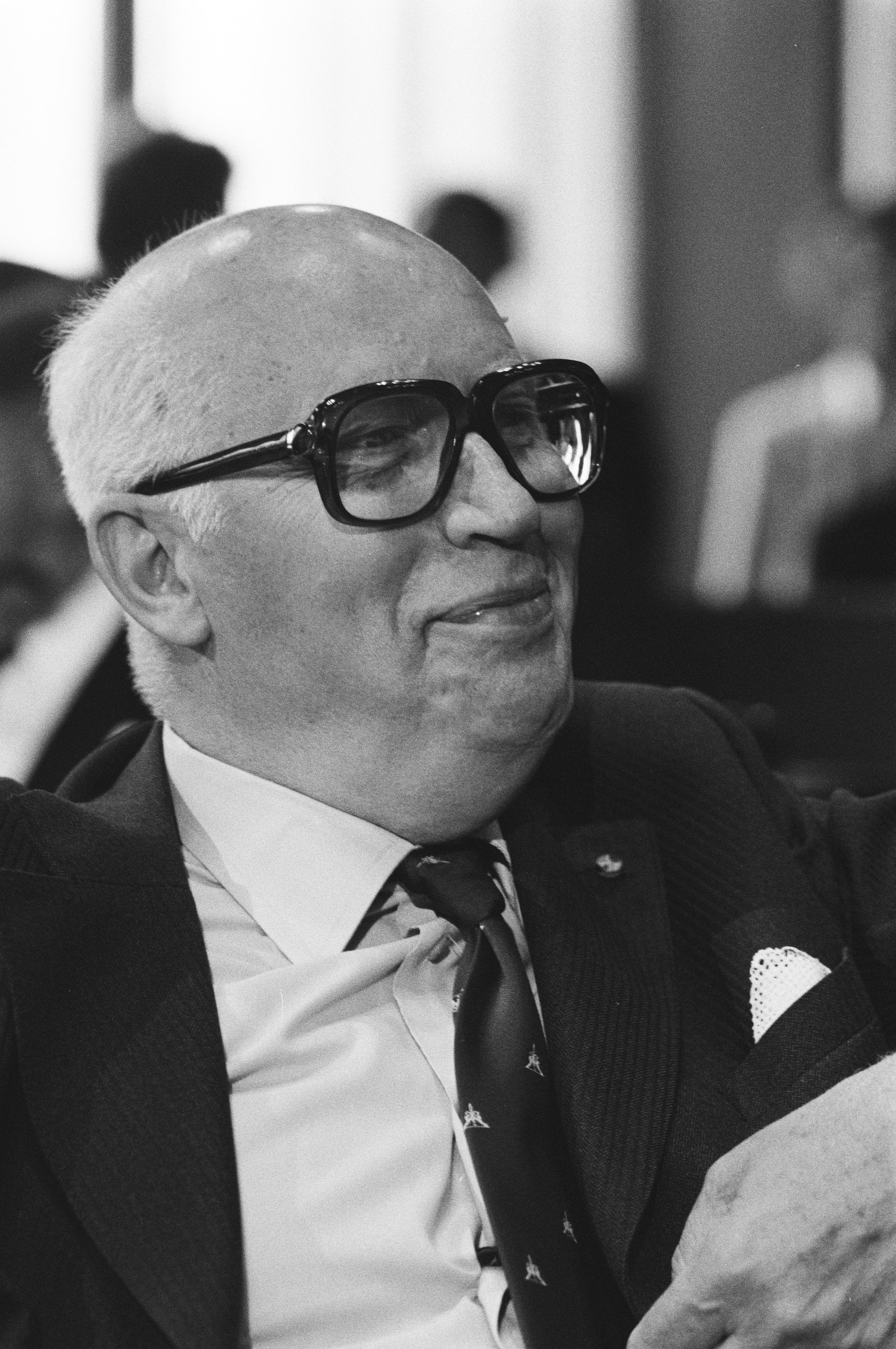 Collectie / Archief : Fotocollectie Anefo Reportage / Serie : Eerste Kamer behandelt abortus-wetsontwerp Beschrijving : De Vries (CDA) Datum : 28 april 1981 Locatie : Den Haag, Zuid-Holland Trefwoorden : parlementaire debatten, politiek, portretten, wetsontwerpen Persoonsnaam : Vries, Klaas de Fotograaf : Antonisse, Marcel / Anefo Auteursrechthebbende : Nationaal Archief Materiaalsoort : Negatief (zwart/wit) Nummer archiefinventaris : bekijk toegang 2.24.01.05 Bestanddeelnummer : 931-4566